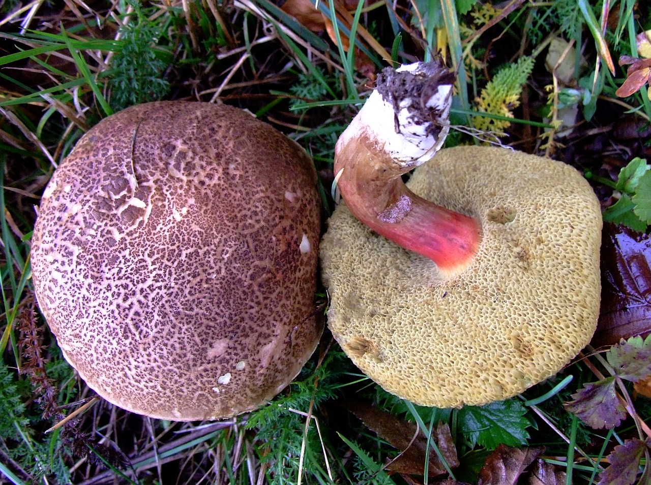 Xerocomus chrysenteron a1